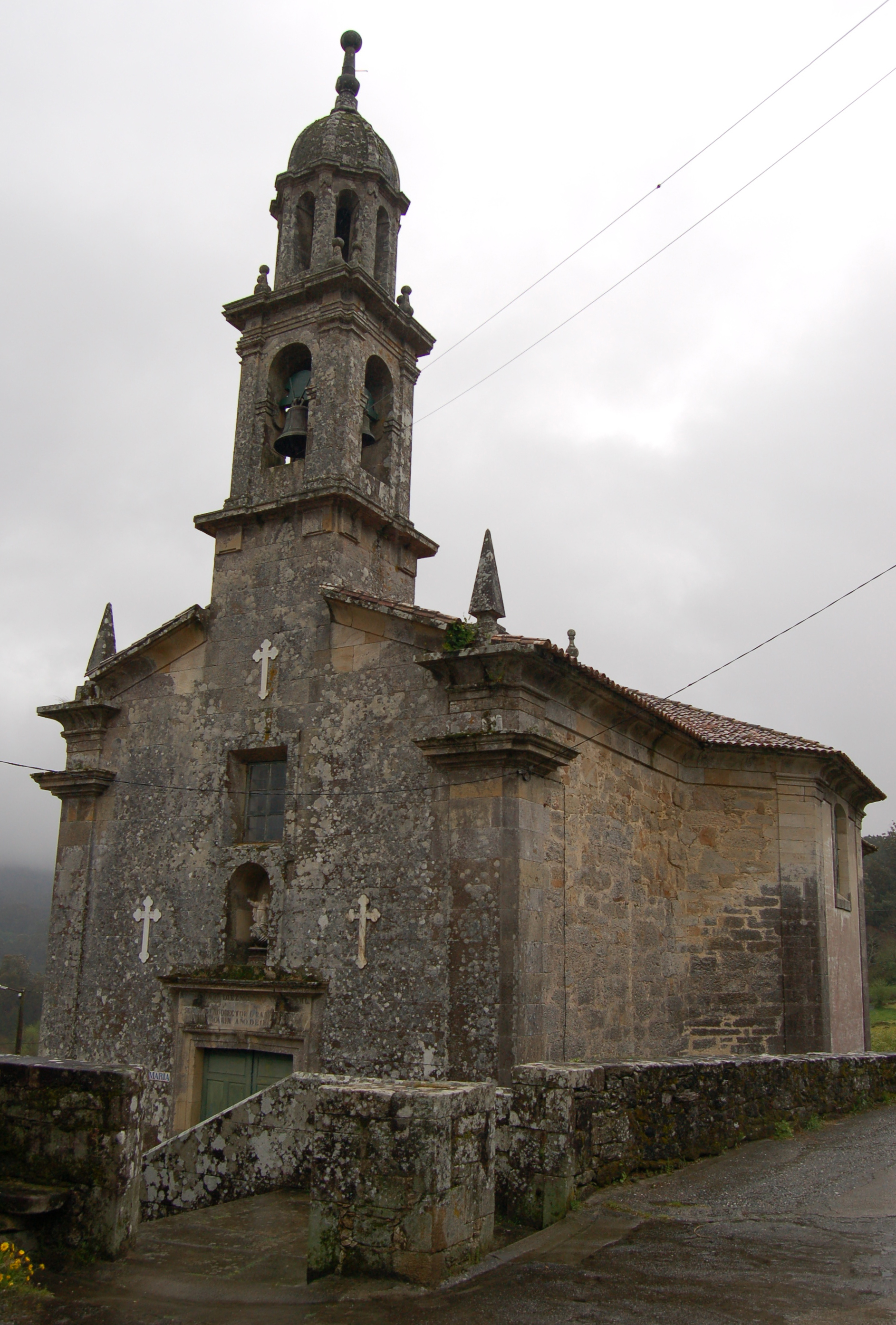 Igrexa parroquial de Santa María de Roo (Noia)